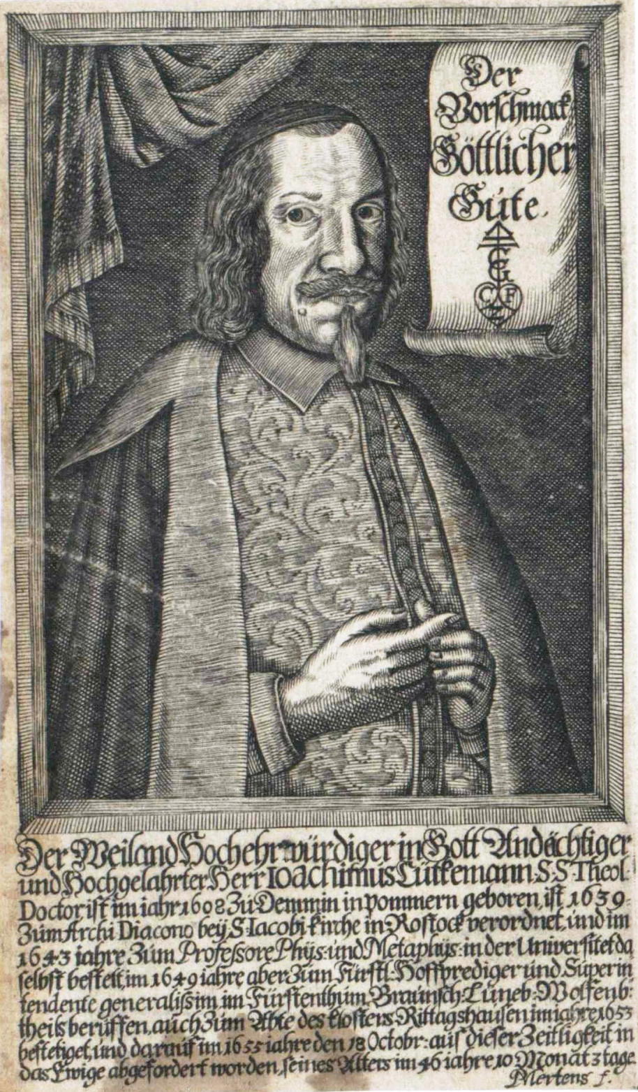 Portrait Lütkemanns aus seinem bedeutendsten Werk, dem "Vorschmack göttlicher Güte"